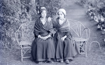 Fonds Trutat TRU B 916